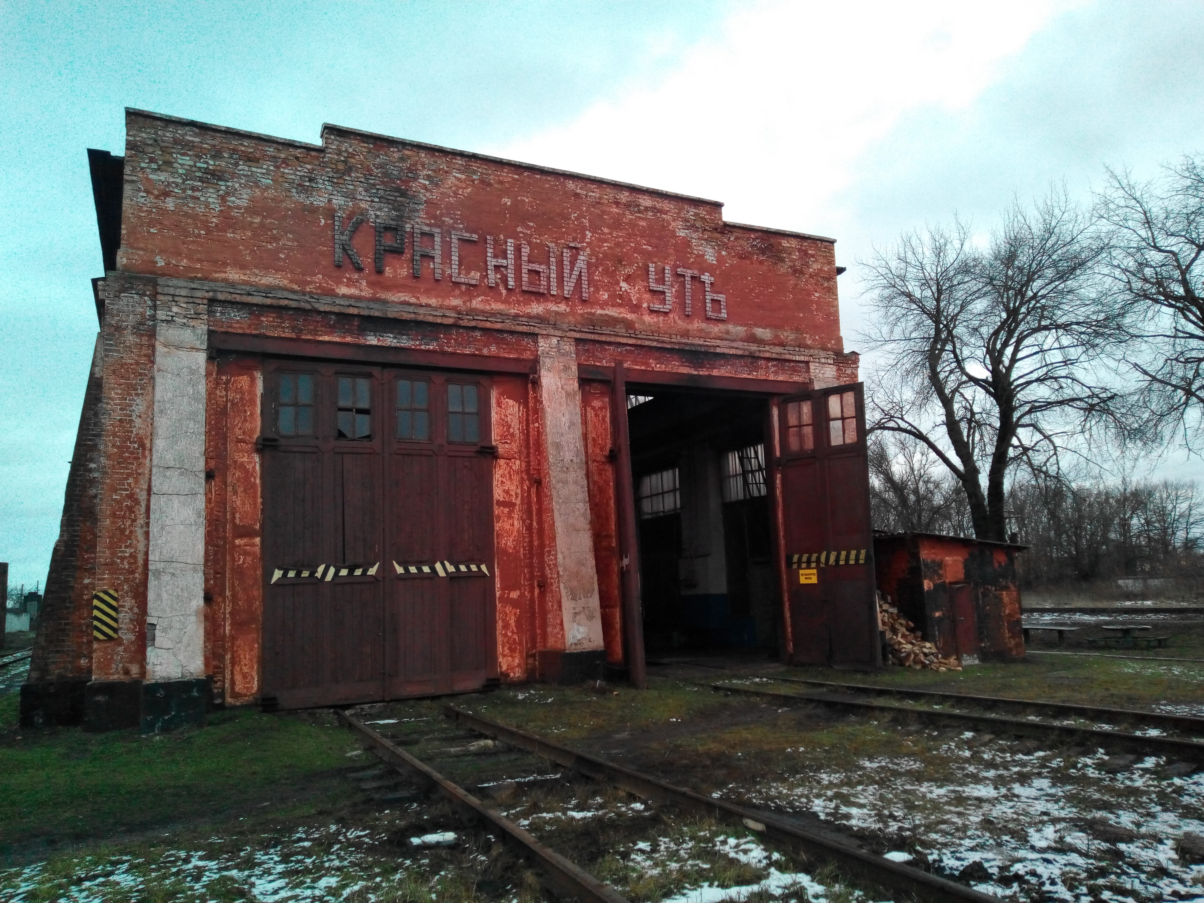 Депо у смт.Цвітково котре було задіяно як одна з локацій зйомок художньо-історичного фільму "Поводир"